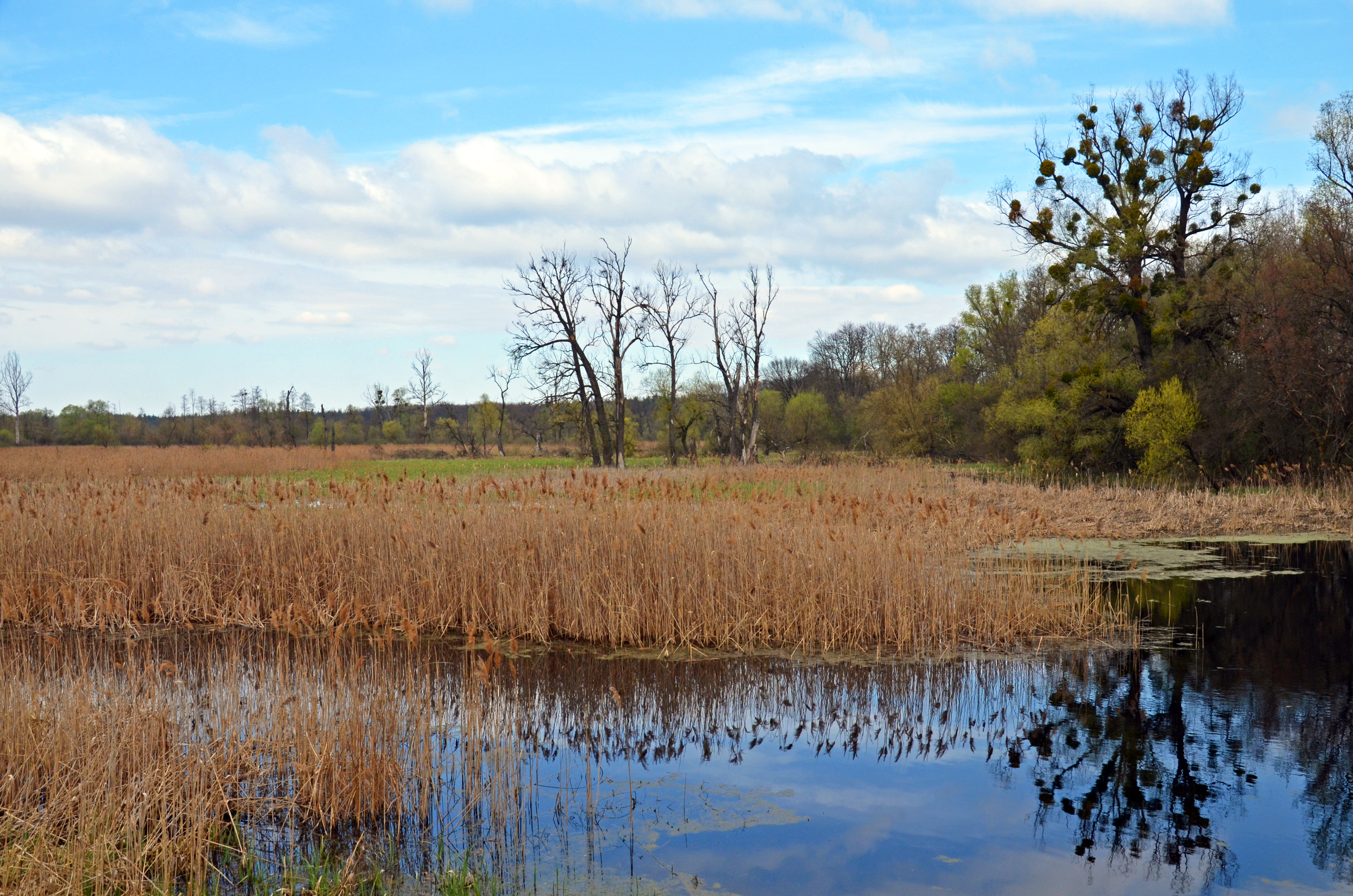 Урочище «Гощів», Обухівський район, Нещерівська та Старобезрадичівська сільські ради